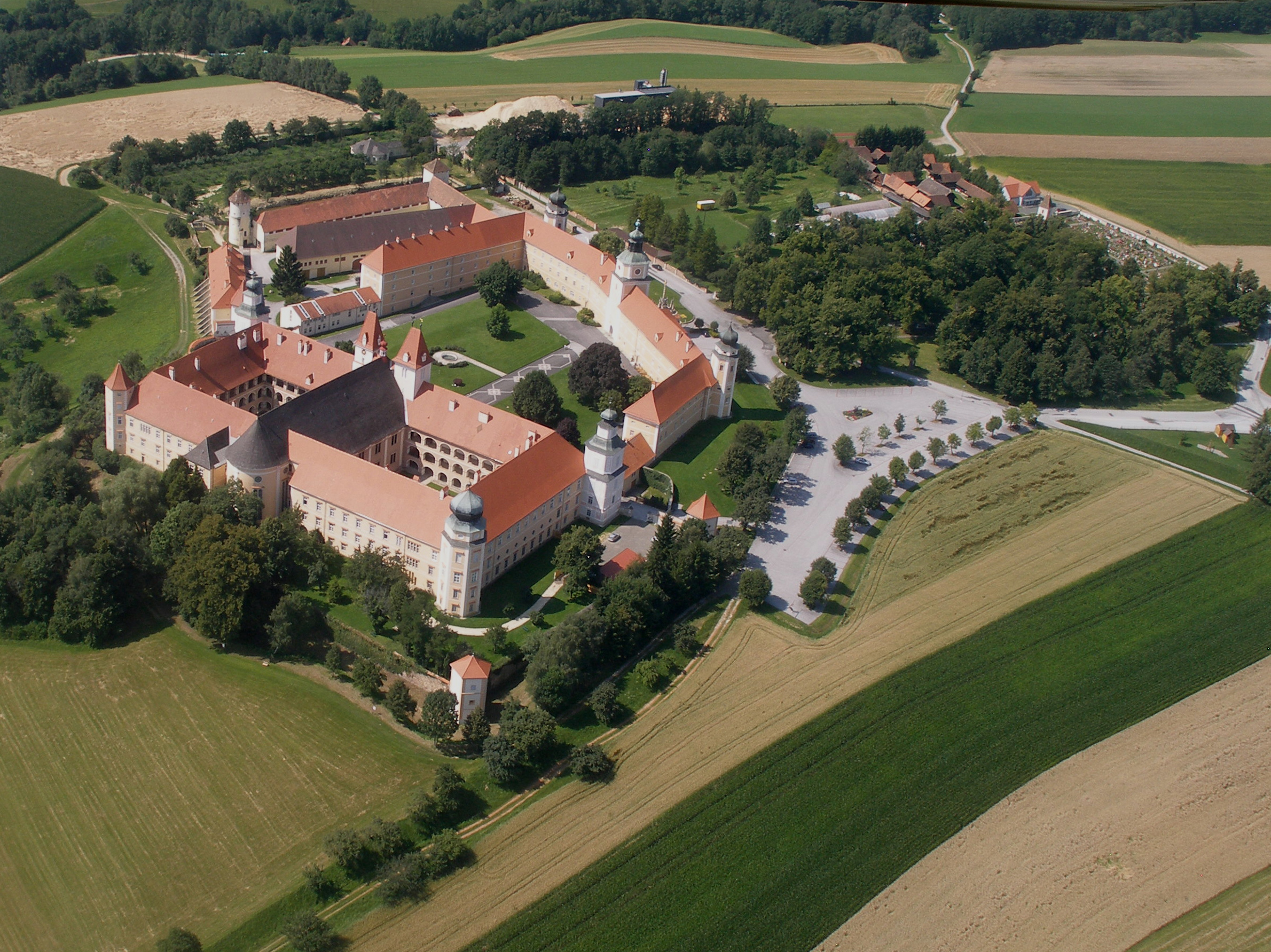 Stift Vorau